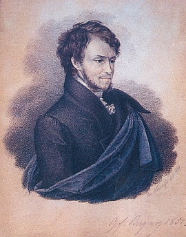 Portrait de (Georg Franz August) Jiří František (August) Buquoy de Longeval (1771–1851), Baron de Vaux, comte de Bucquoy, écrivain, mathématicien, chimiste, économiste, homme d'affaire tchèque/autrichien.